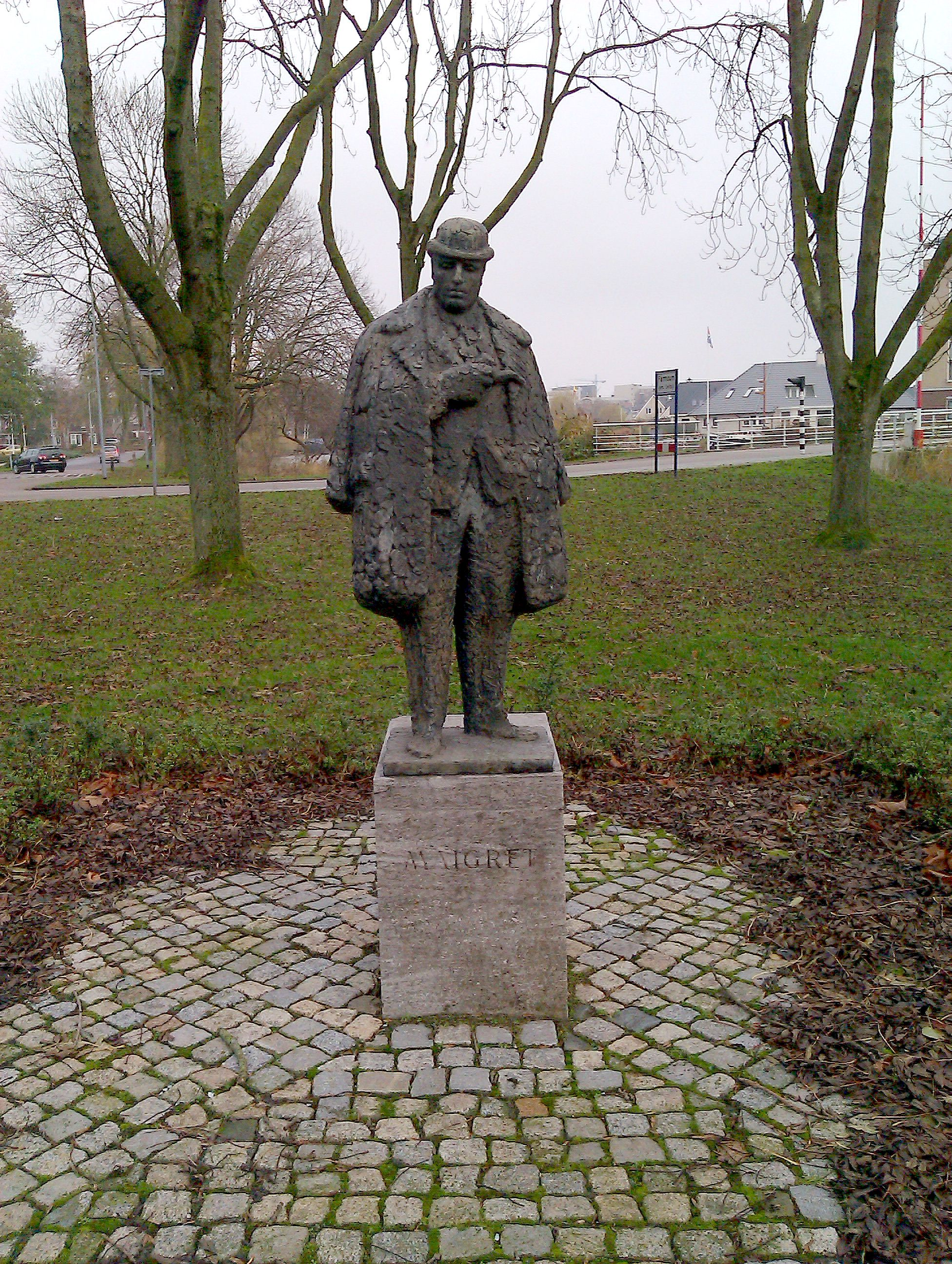 Maigret